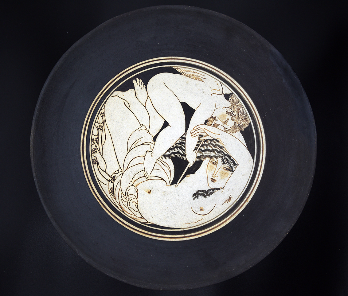 formes néogrecq